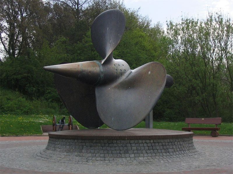 Beschreibung: Prinz Eugen / Schraube Fotograf: Darkone, 1. Mai 2004